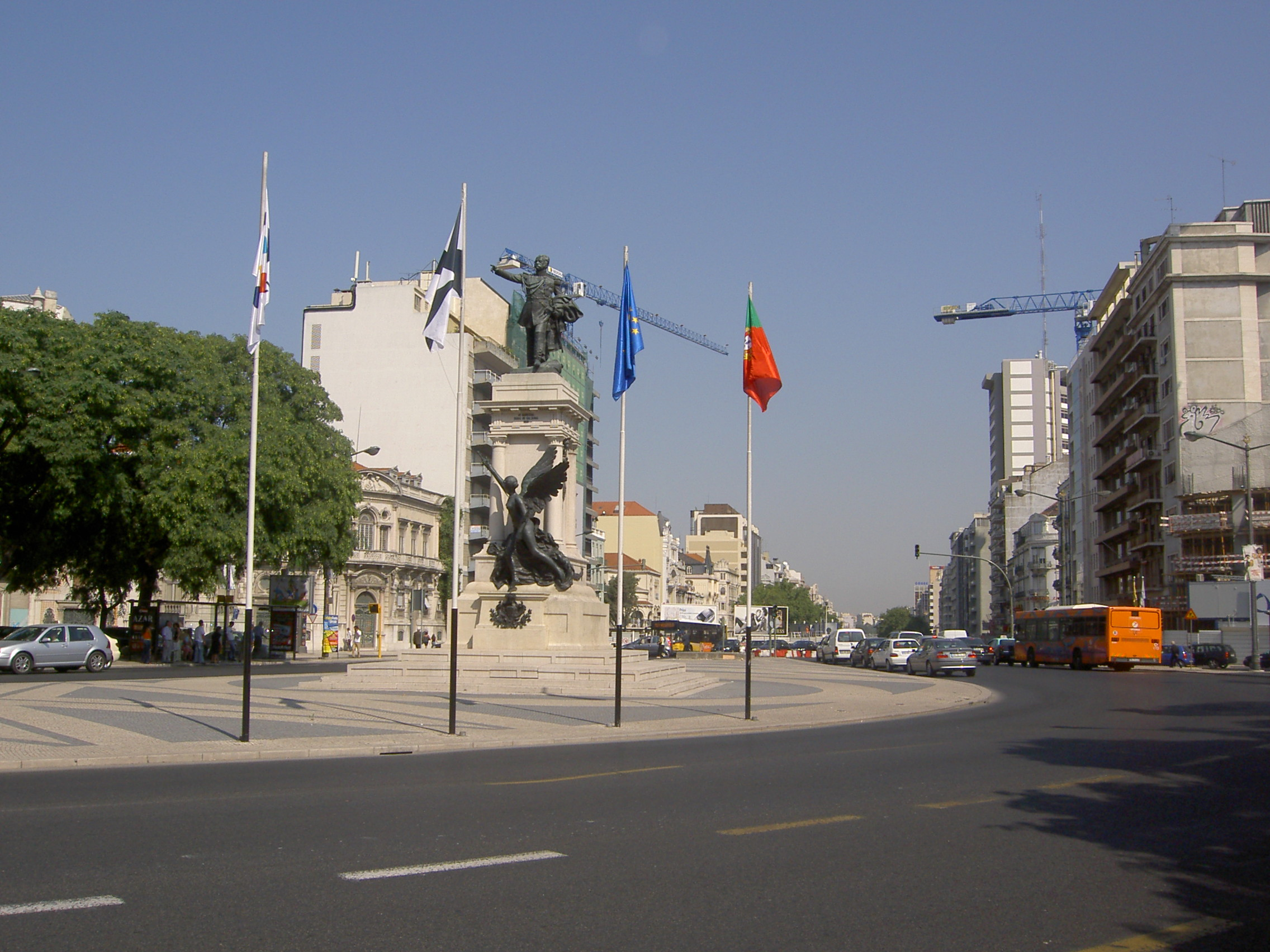 Praça Duque Saldanha in Lisbon.